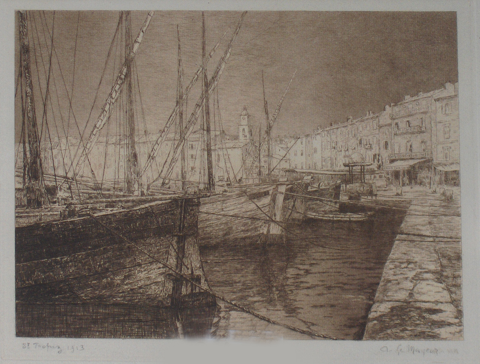 "St. Tropez" (1913) ets door Adrien Le Mayeur de Merpres (1844-1923)